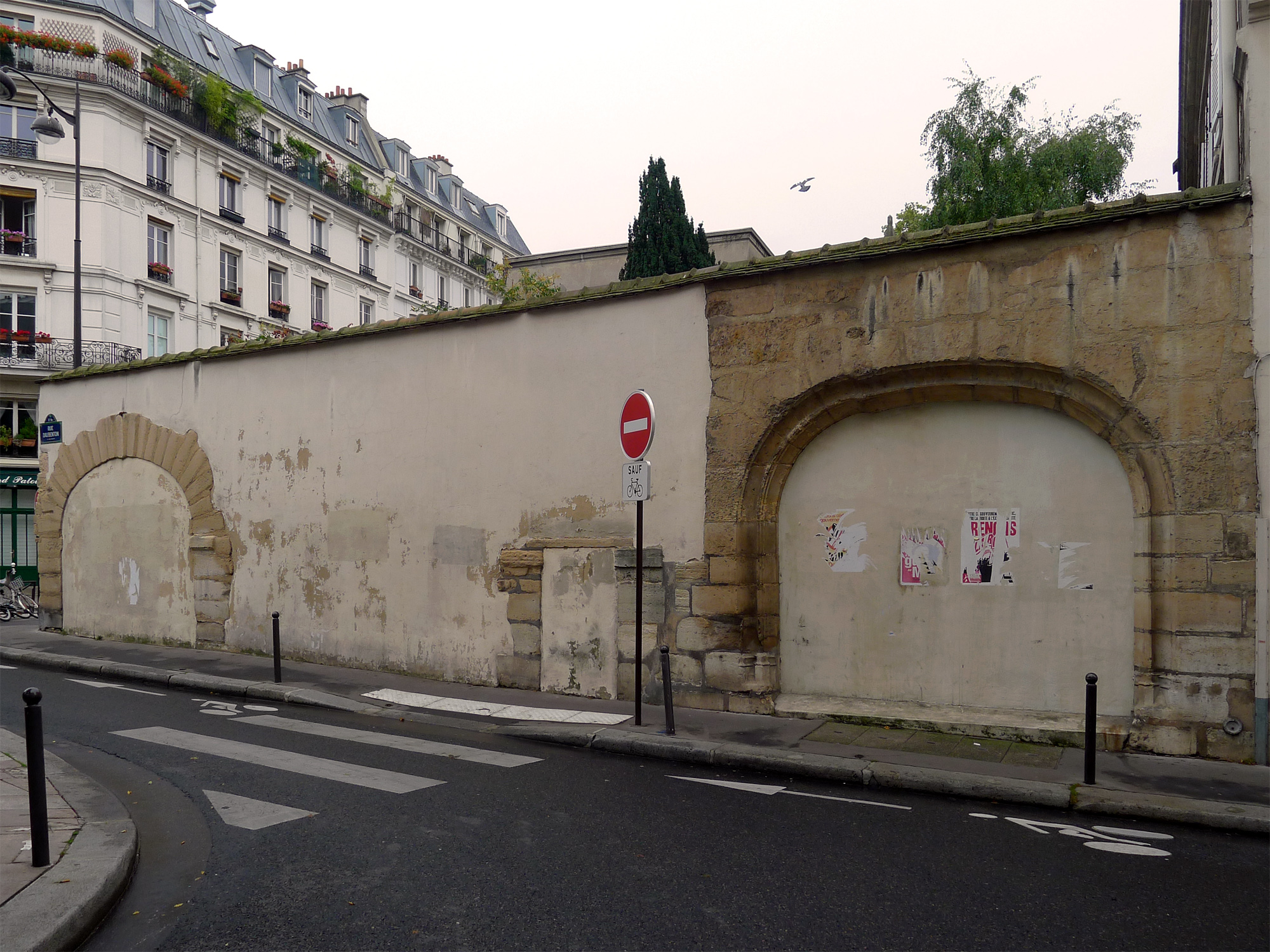 Rue Daubenton (église St Medard) - Paris V